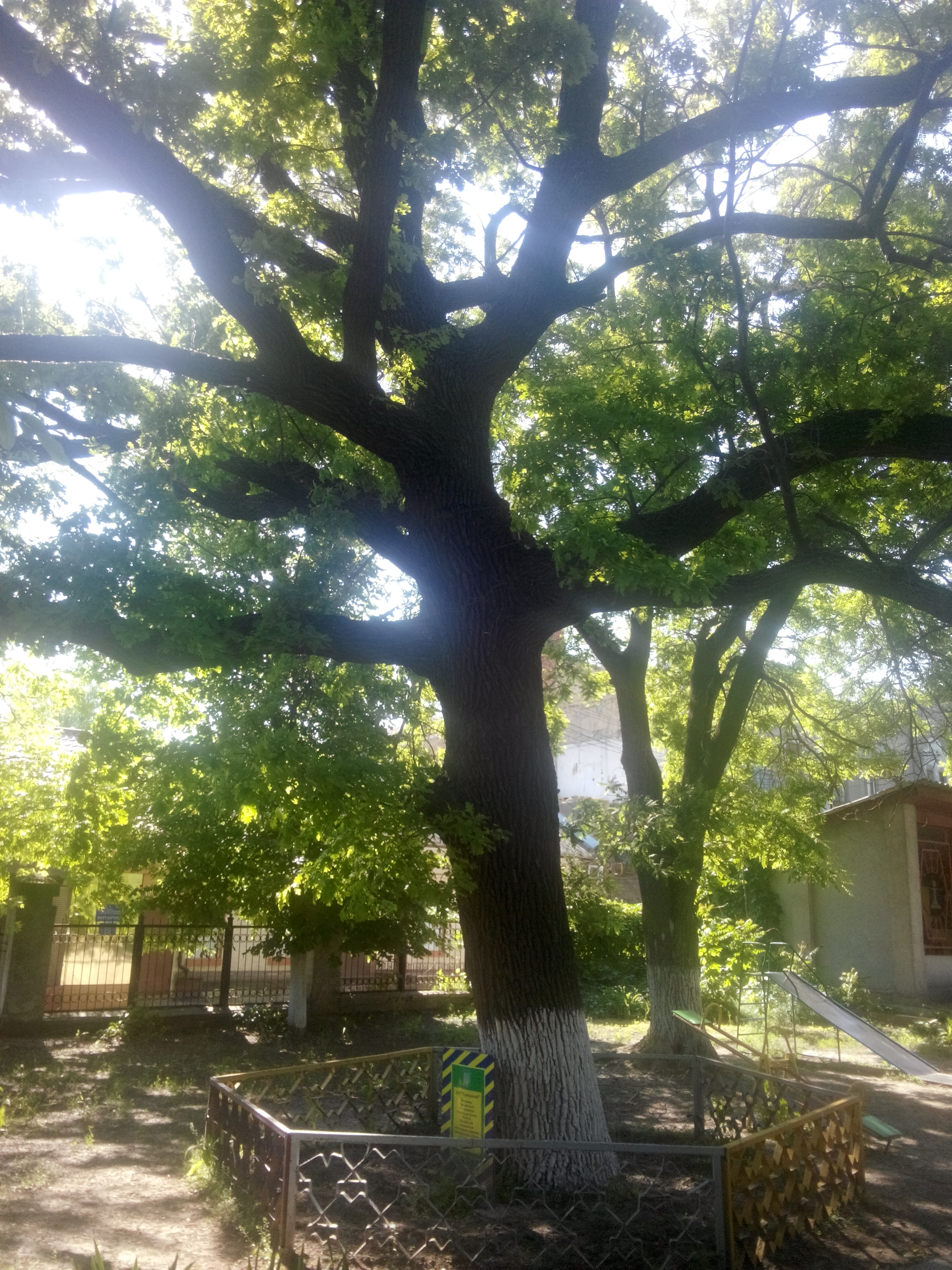 Дуб черешчатий, м. Херсон, вул. Леніна, 18